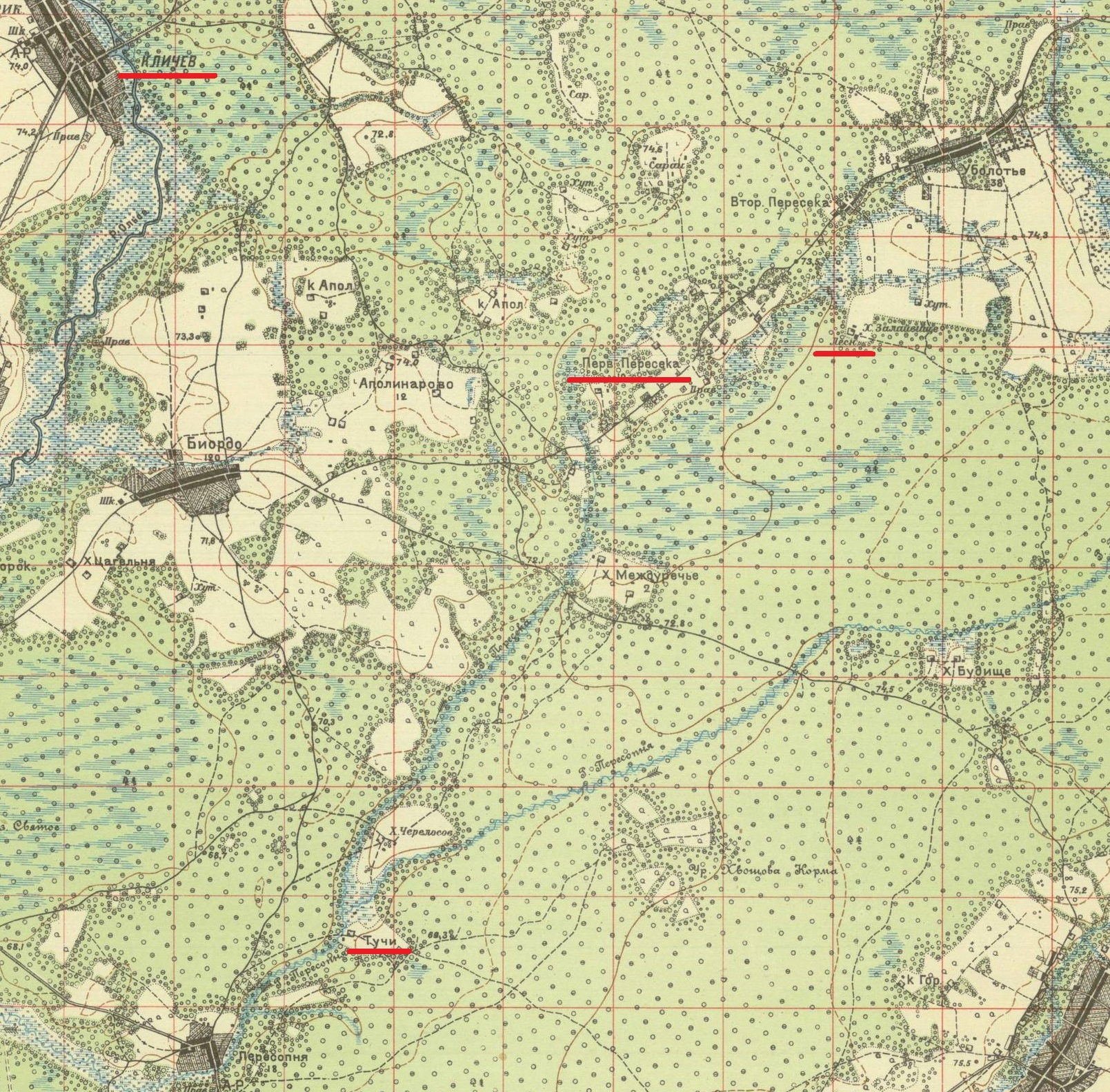 Kliczew, Przesieka i Tuczy na sowieckiej mapie wojskowej z 1926 roku (LXXVI-21).